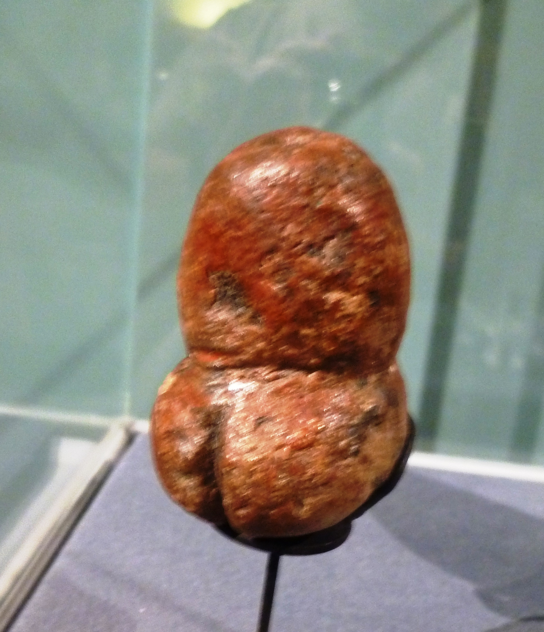 Die Venus von Mauern, eine steinzeitliche Figur, fotografiert in einer Ausstellung in Trento.